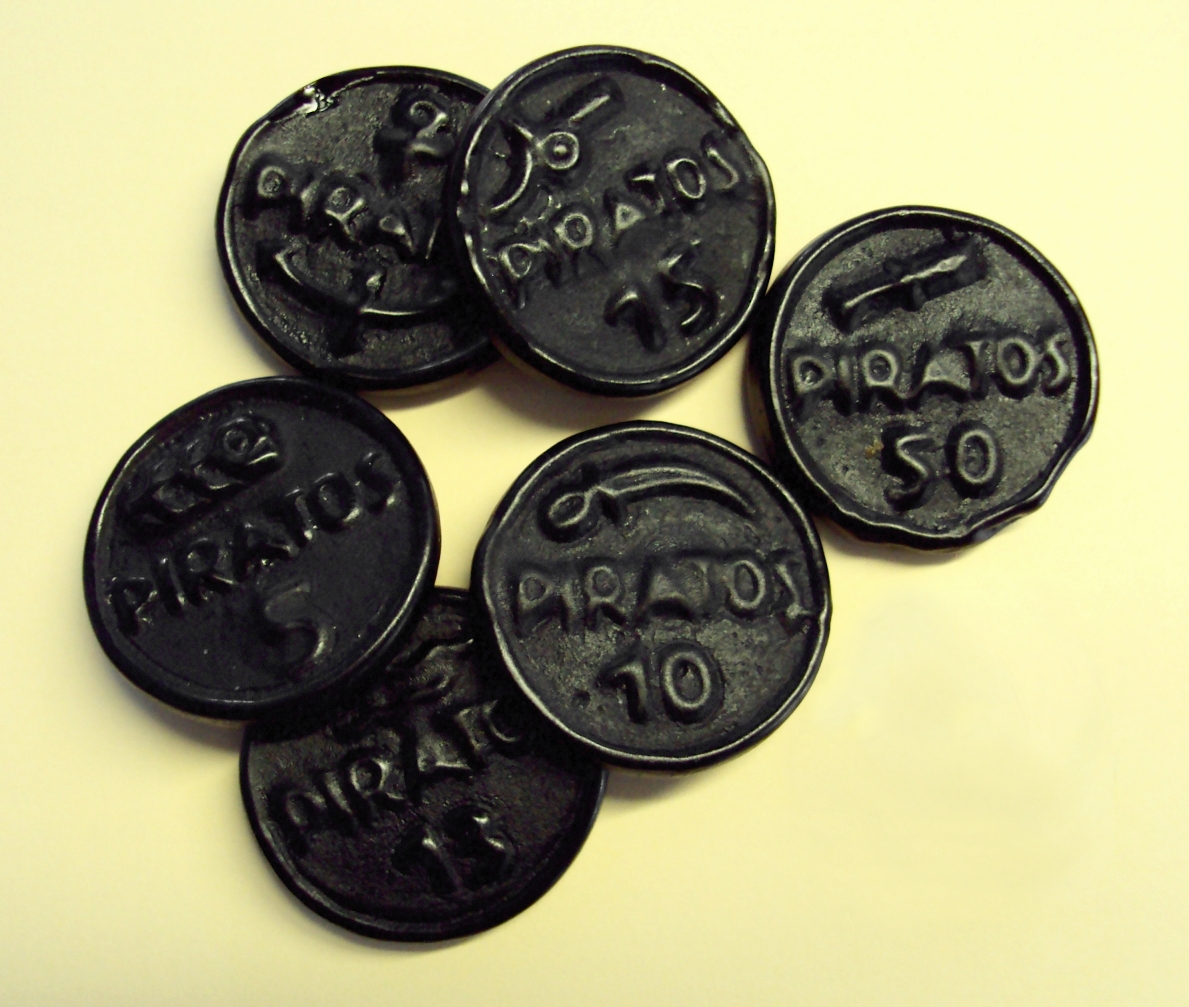 Lakritzmünzen mit Vergleichsmünze (50 Euro-Cent)